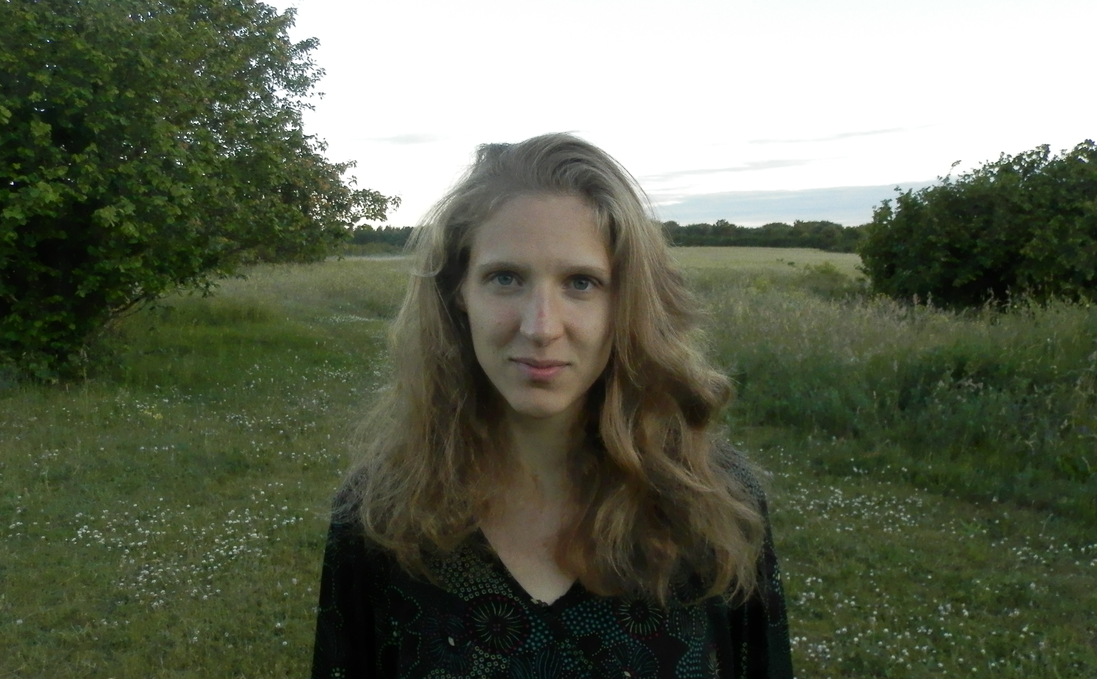 Foto ilmus esmakordselt ajalehe "Postimees" arvamusportaalis.